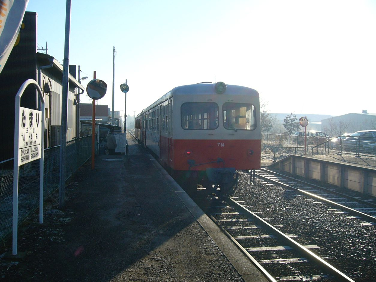 玉里を発車するキハ714形